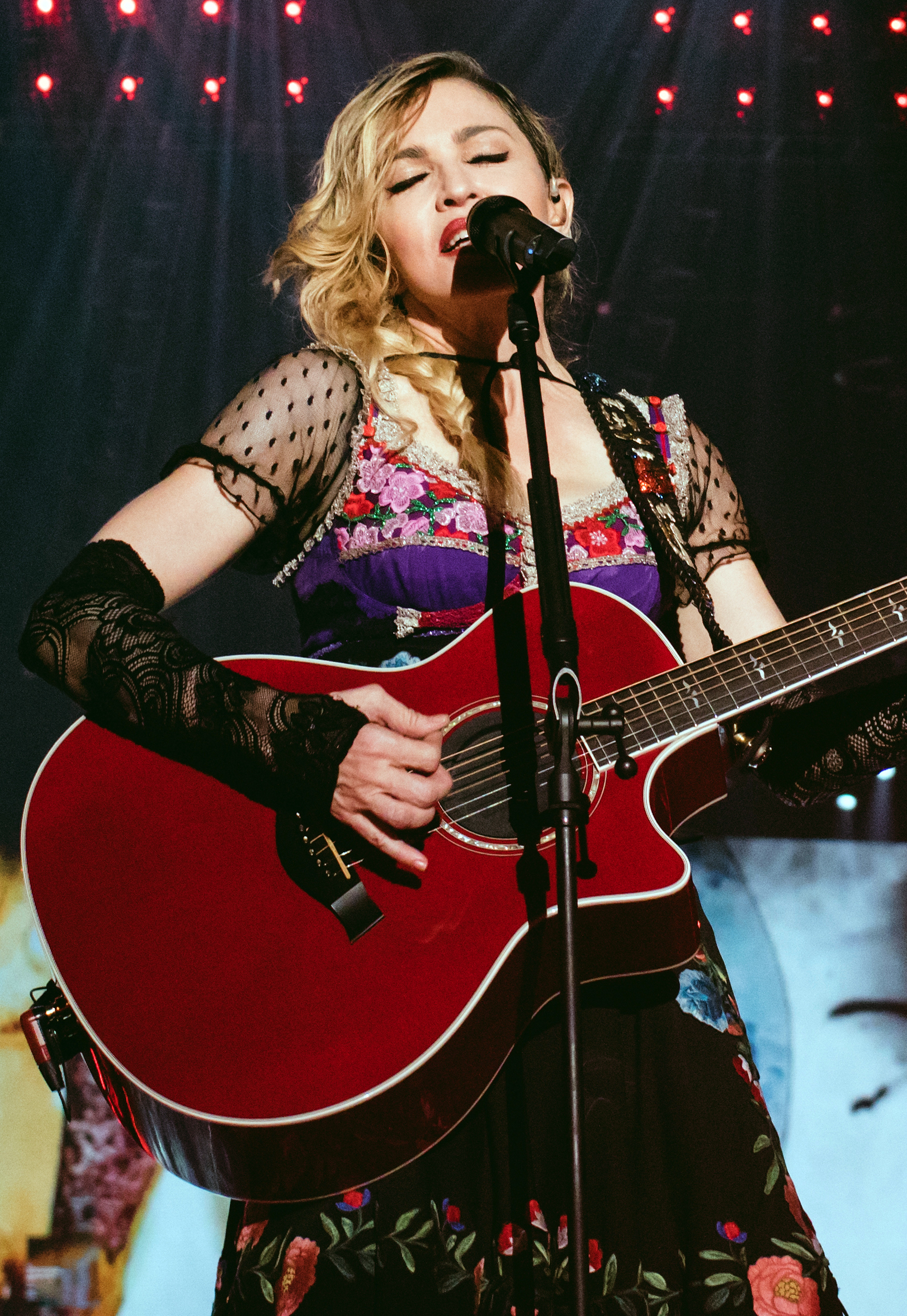 Philadelphia, PA